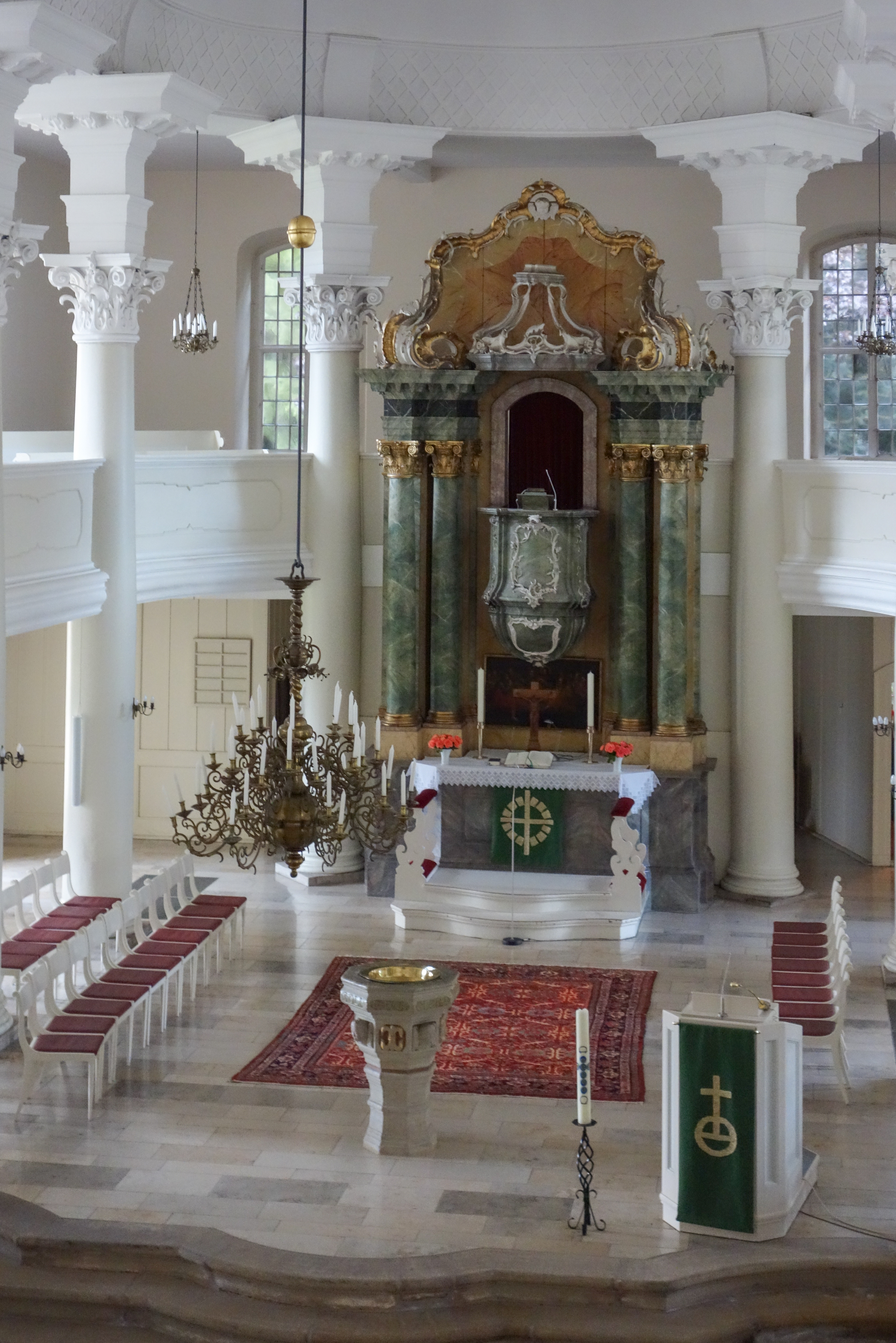 Stiftskirche Steterburg, Blick von der Orgel in den Altarraum